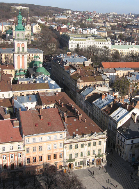 Вулиця Руська у Львові